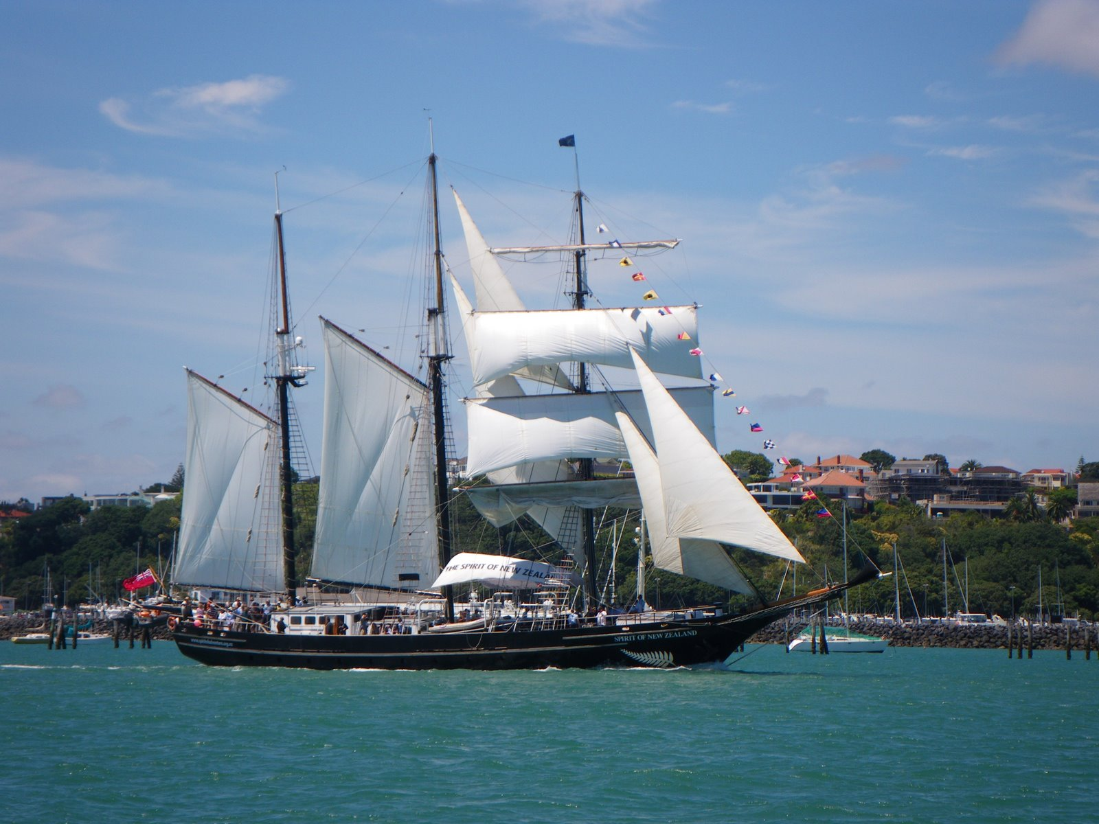 Le Spirit of New Zealand